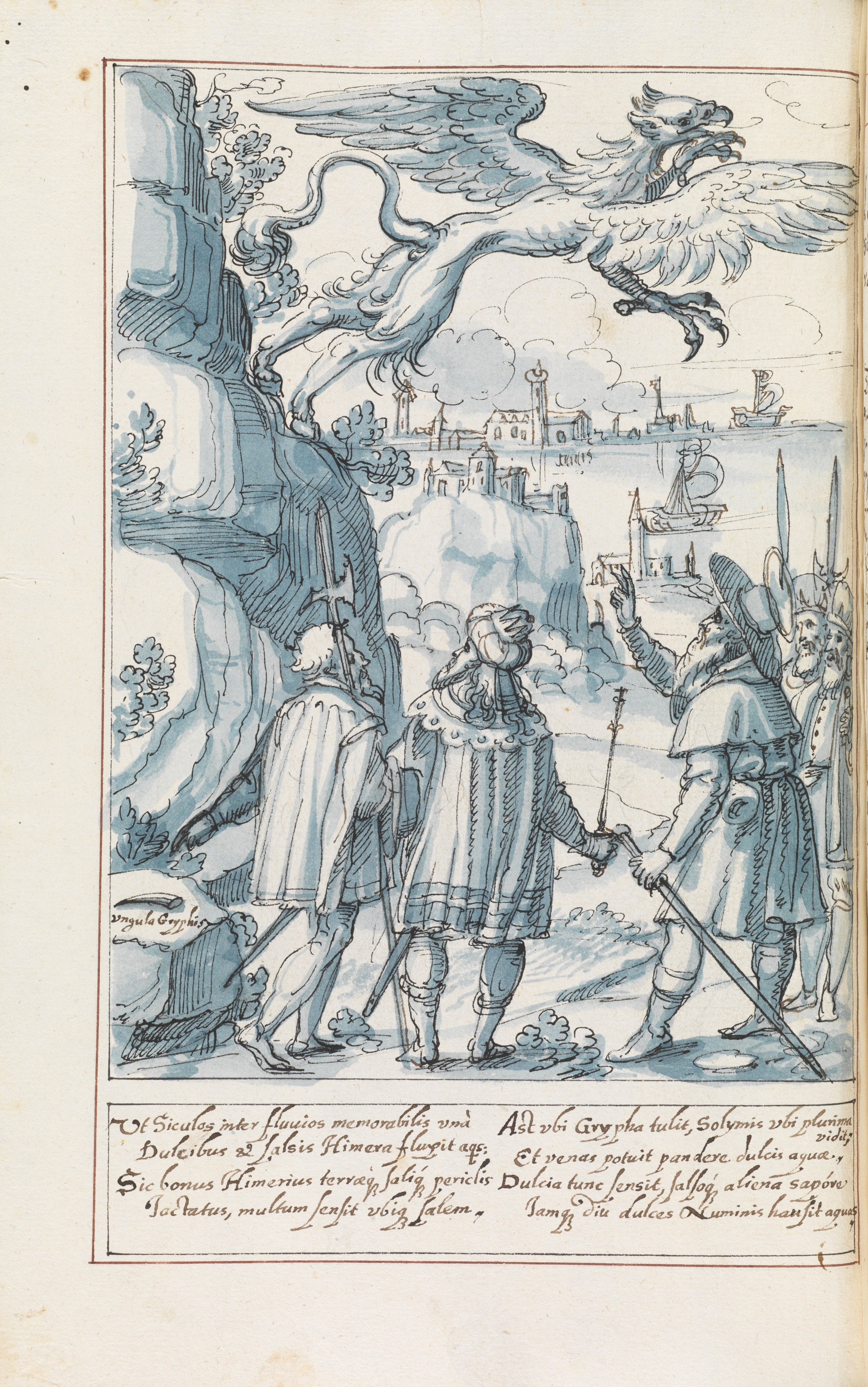 Vorzeichnung von Hans Asper d. J.: Der heilige Hymerius befreit eine Insel von einem Vogel Greif. In: Heinrich Murer: Helvetia Sancta. Paradisus beatorum Helvetiae florum: Das ist ein heiliger lustiger blumen gartten, deren fürnemste blumen so von anfang der christenheit bis auf unsere zeit in heiligkeit des lebens und mancherley wunder wercken in Helvetia gegrünnet. Ittingen, 1638. Frauenfeld, Kantonsbibliothek Thurgau, Y 111, p. 83v. (E-codices)